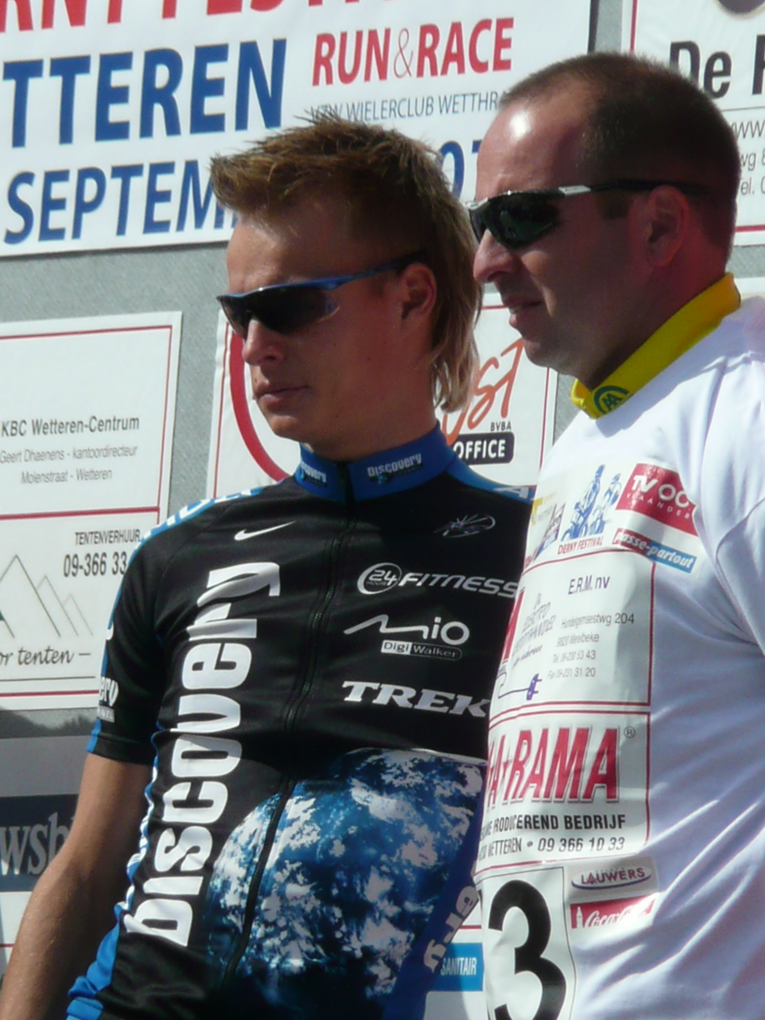 Gianni Meersman tijdens het Dernyfestival in Wetteren 2007